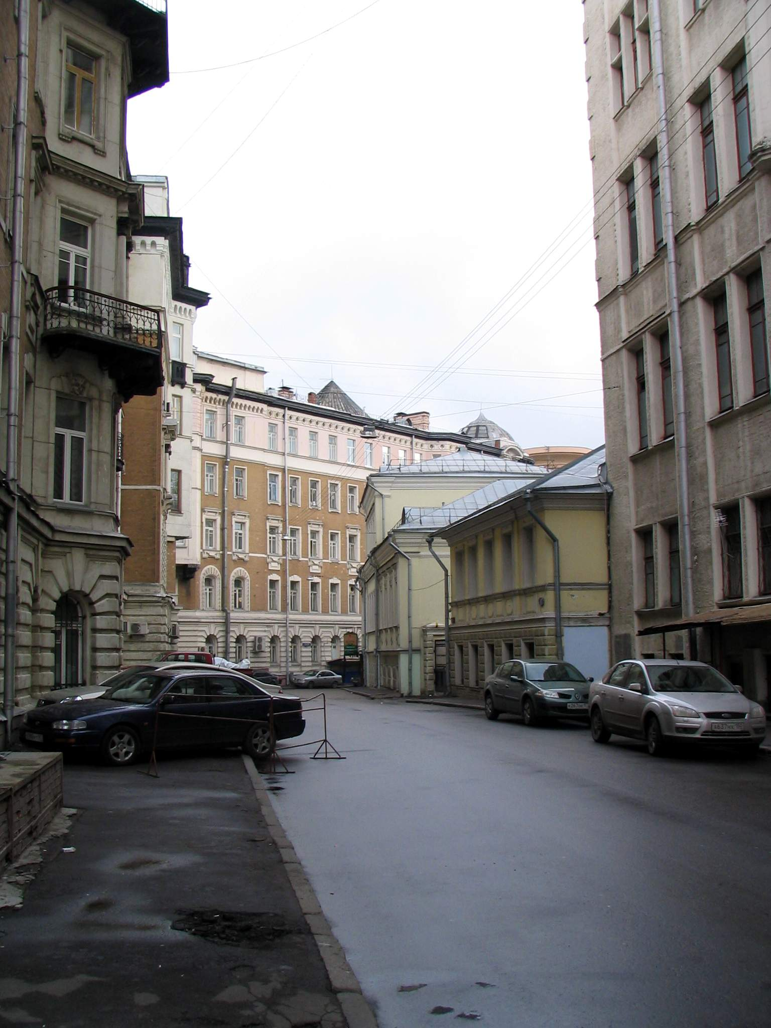 Bobrov Lane, Moscow